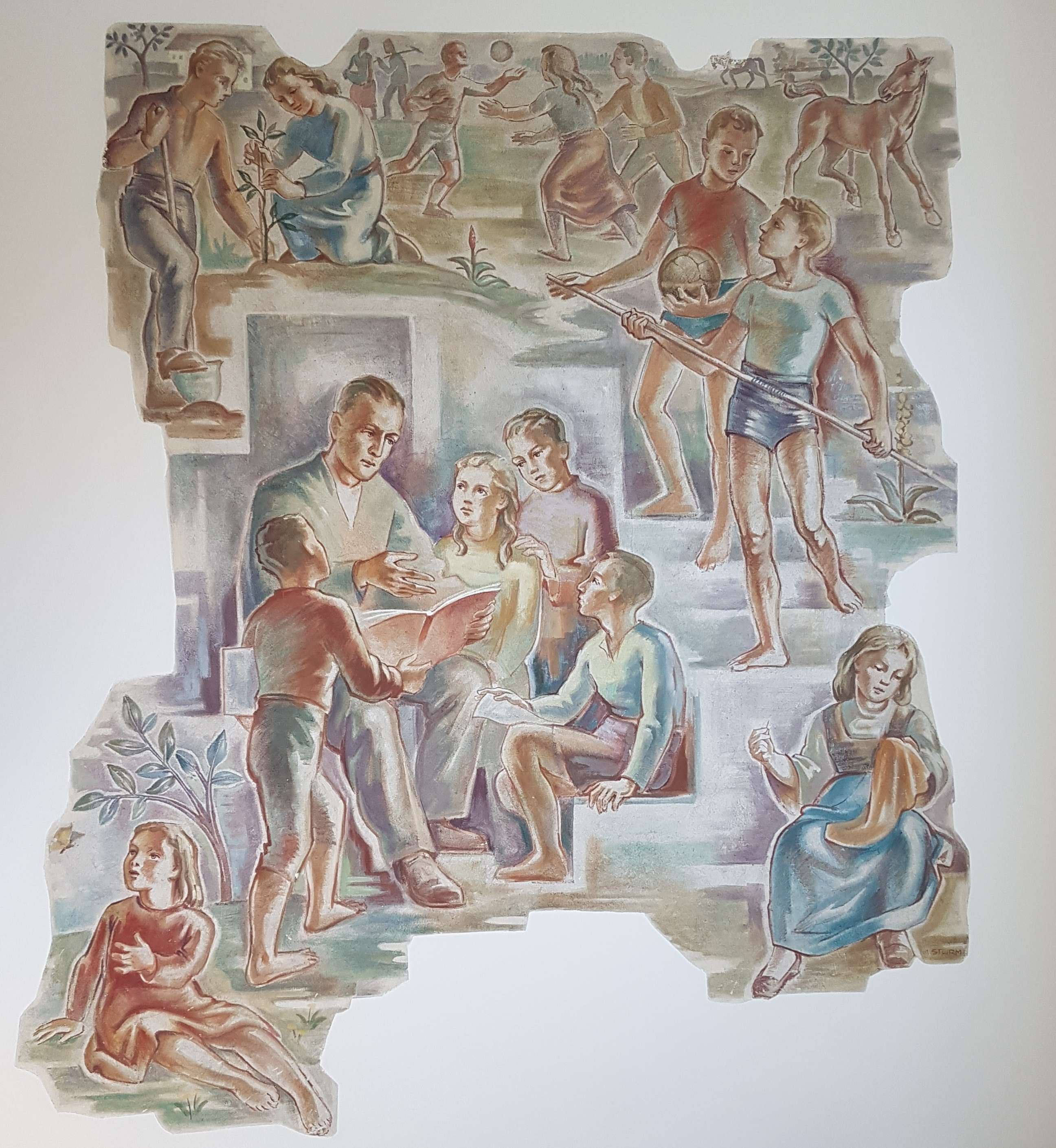 Wandmalerei, geschaffen anlässlich der Schuleröffnung 1954.